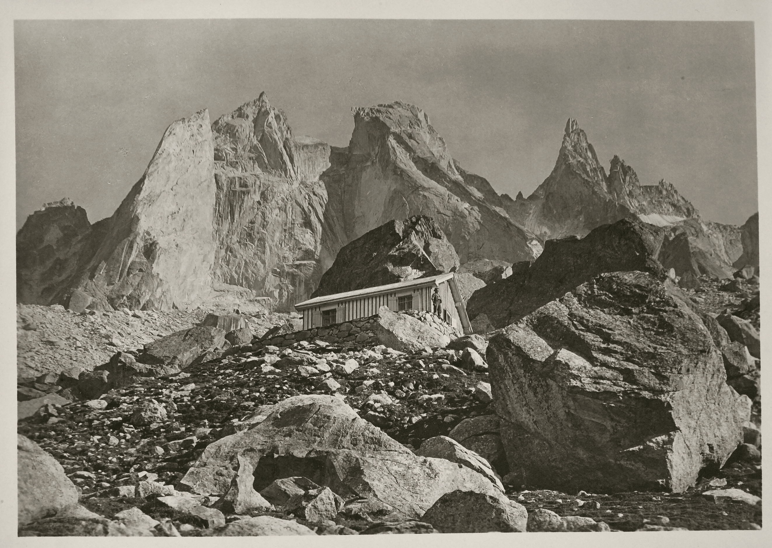 Sciora Dafora, Punta Pioda di Sciora, Ago di Sciora und Sciora-Hütte, Bregalia GR, Schweiz